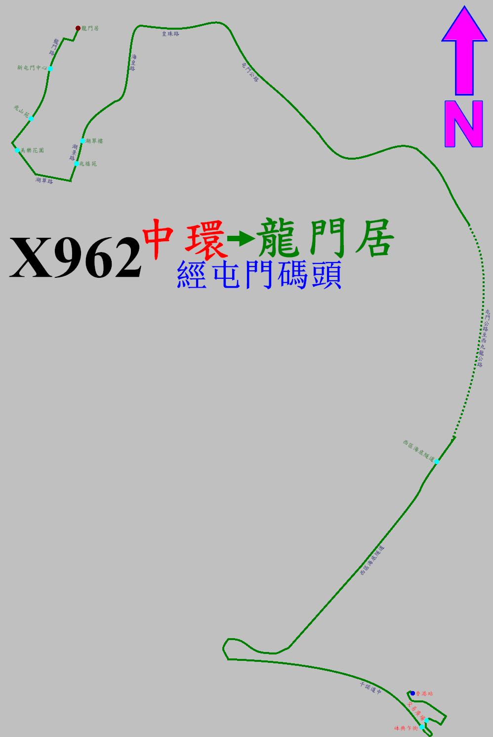 中文（香港）: 過海隧巴X962線的走線圖